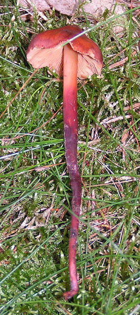 Phaeocollybia jennyae - Cortinariaceae - Agaricales; de: Feuerroter Wurzelschnitzling